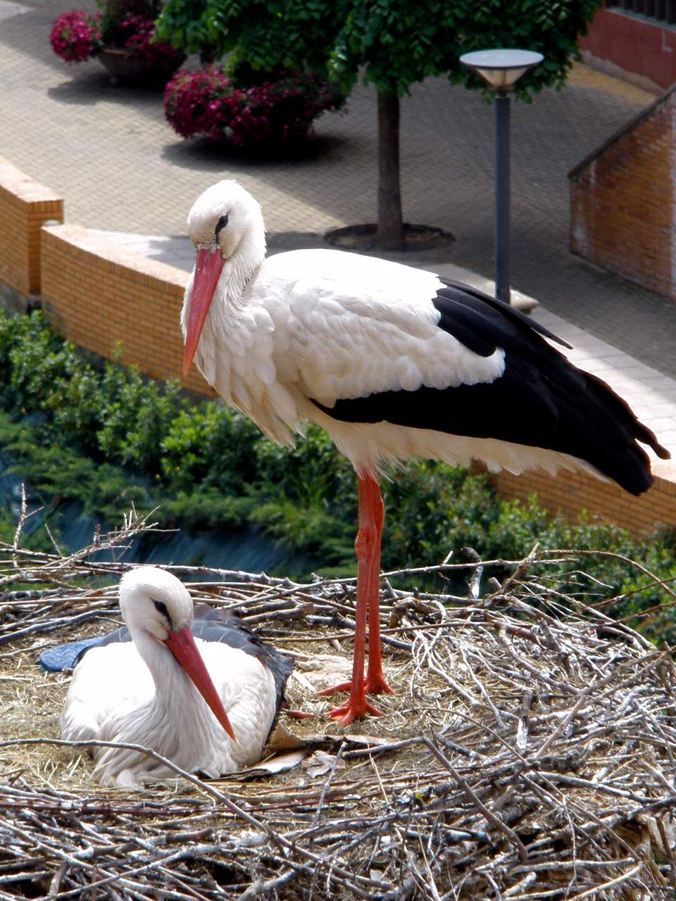 Cigüeñas en el tejado de la Colegiata de San Miguel, en Alfaro (La Rioja, España). Imagen tomada desde el campanario de la Colegiata